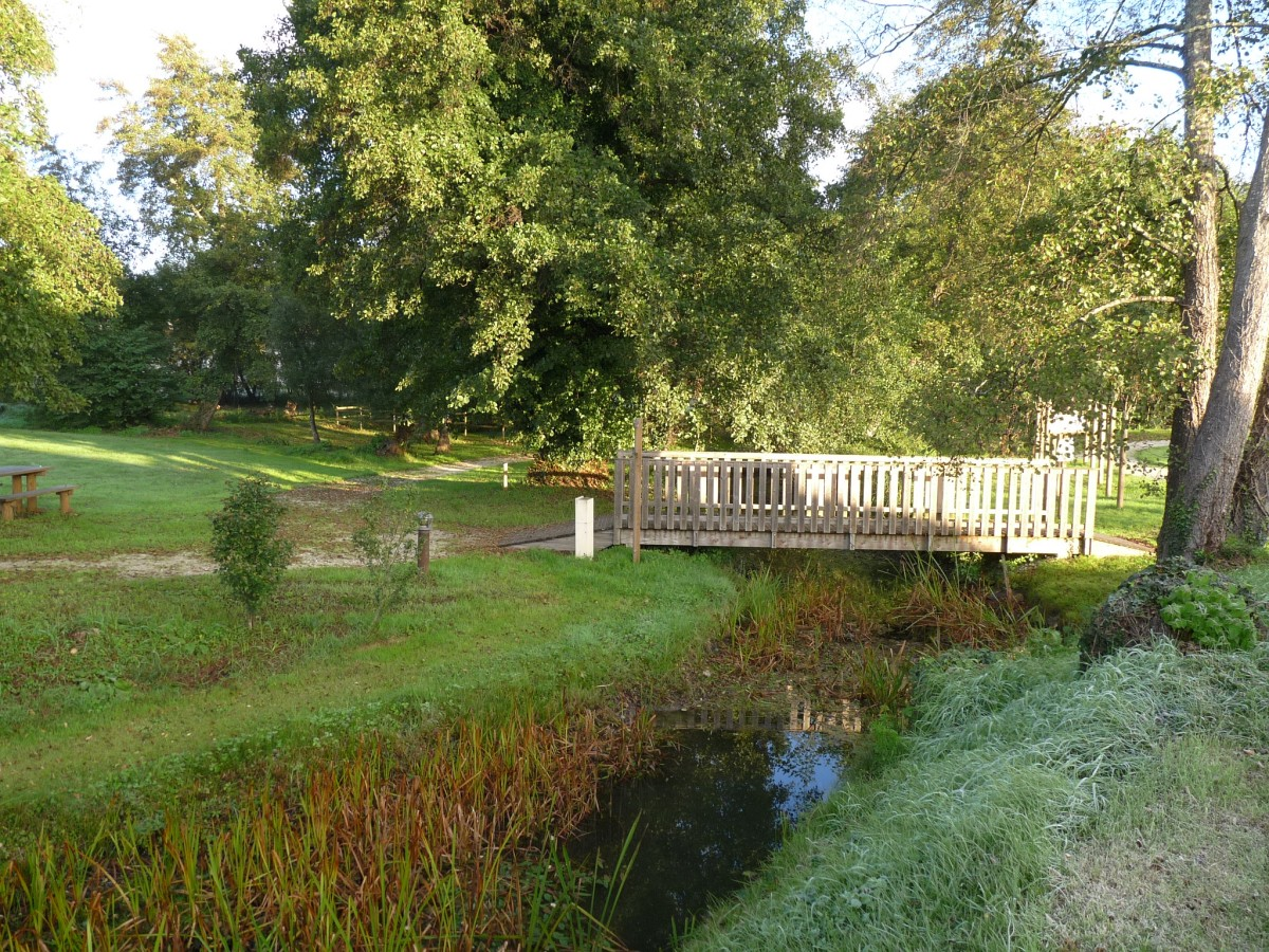 Espace vert et ruisseau (le Meudon, affluent de la Saye, l'Isle, la Dordogne), bourg de Bedenac, Charente-Maritime, France